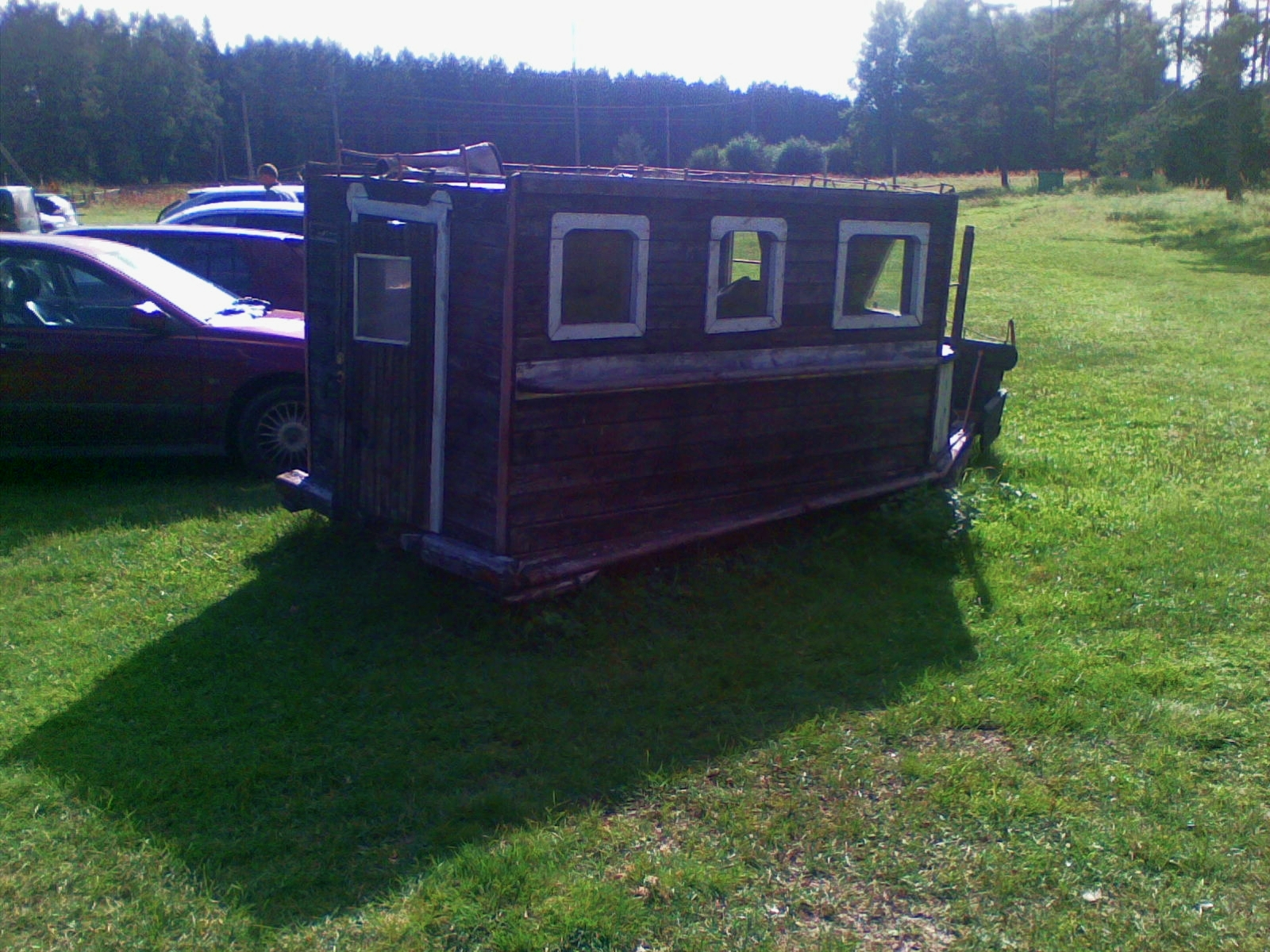 Restaureeritud postisaan Mustjõe kõrtsitalus Harjumaal.